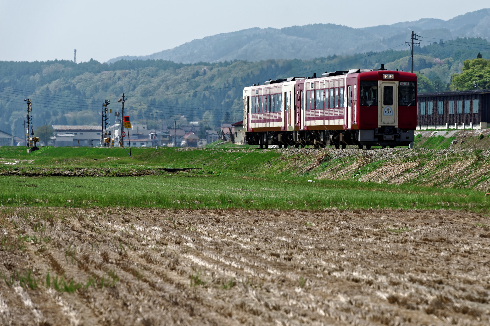 JR東日本・飯山線を走るキハ110形気動車「おいこっと」。信濃平‐戸隠野沢温泉間にてさちどん(体調ちょっと不良中)氏が撮影。